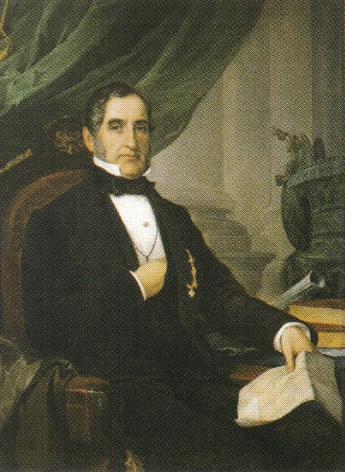 "Pasquale Revoltella", Image of Pasquale Revoltella by Tito Agujari (1862)